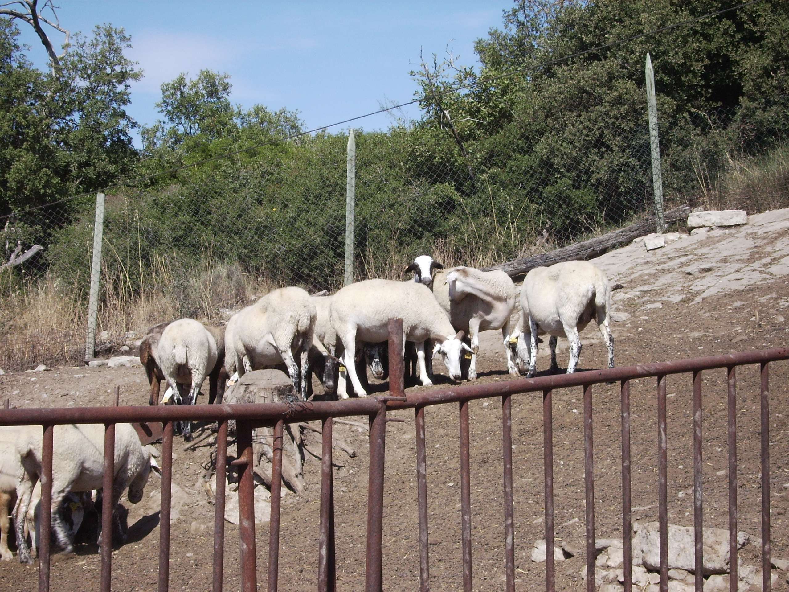 Image:Ovelles.jpg Lambs in Castelltallat,Catalonia